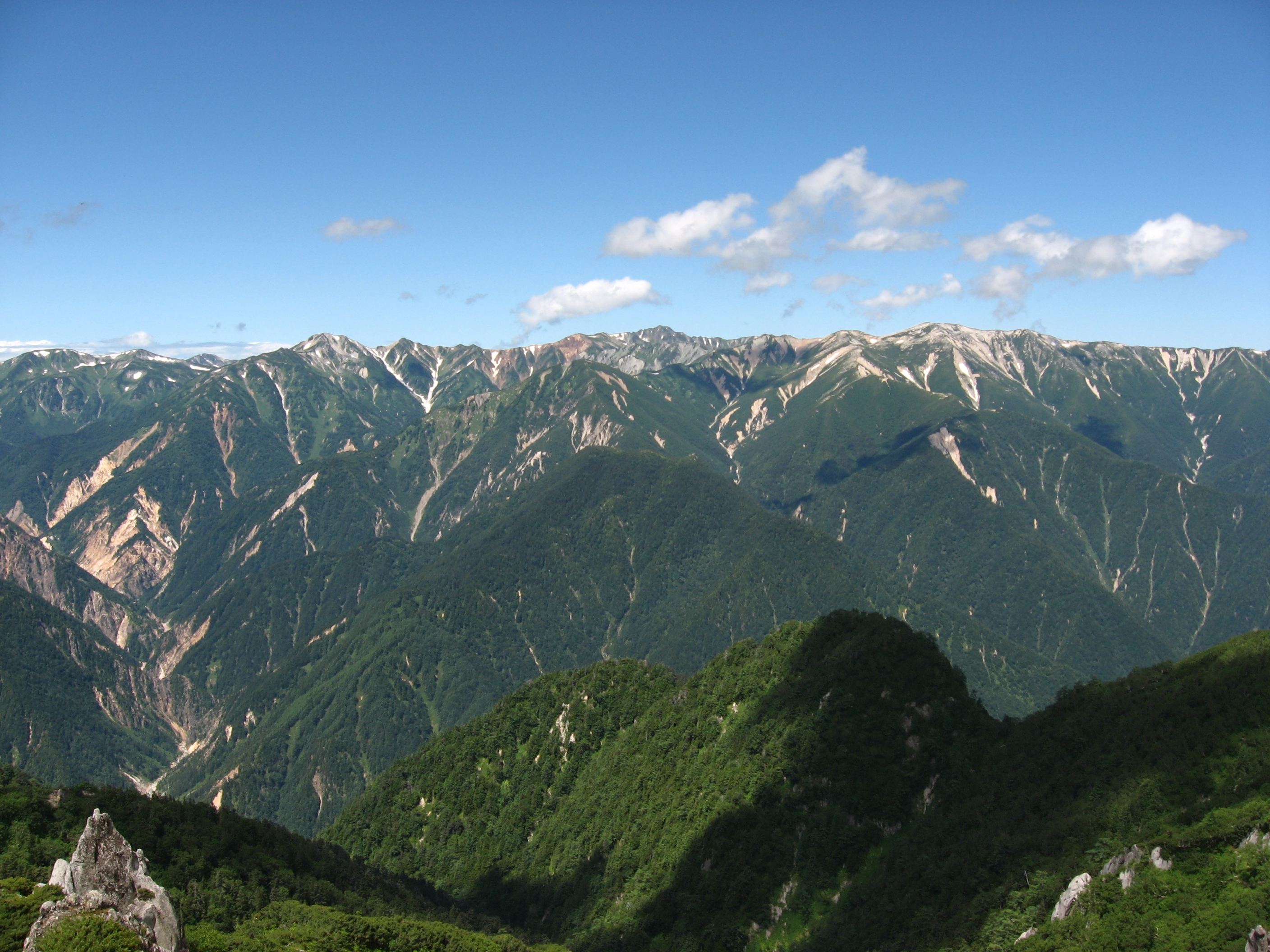 燕山荘付近から見た飛騨山脈の山々